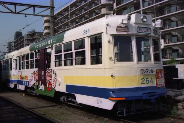 阪堺電軌モ251型254